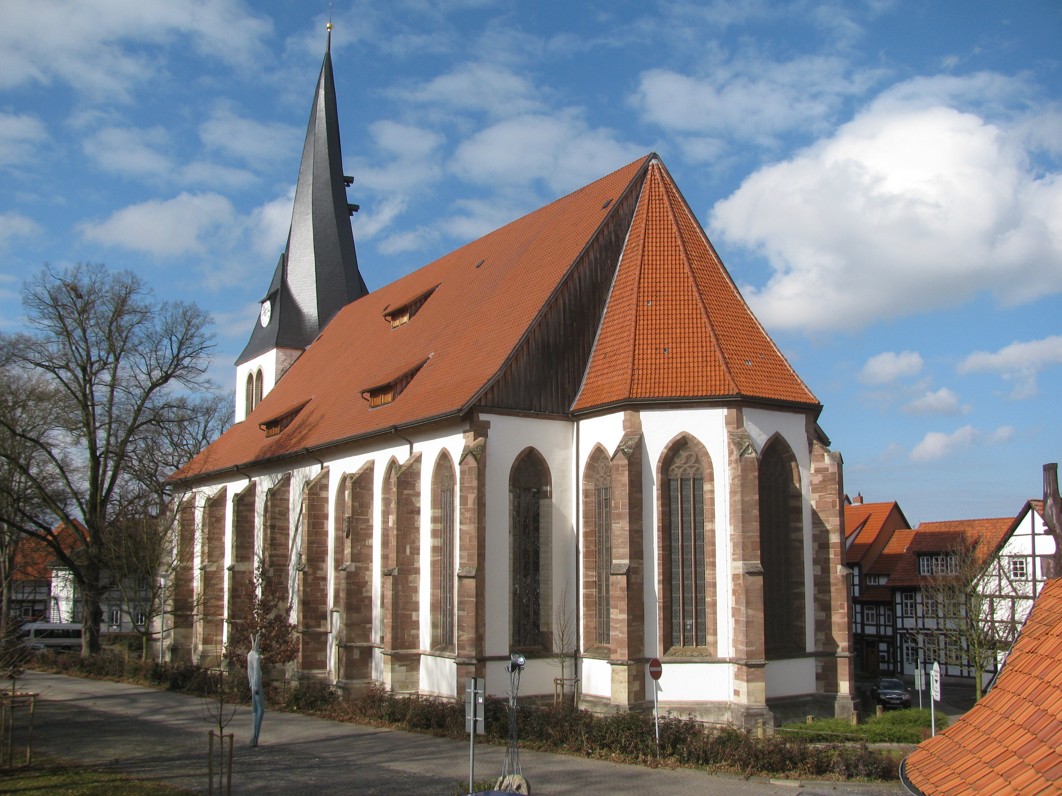 Northeim, Niedersachsen, St. Sixti.